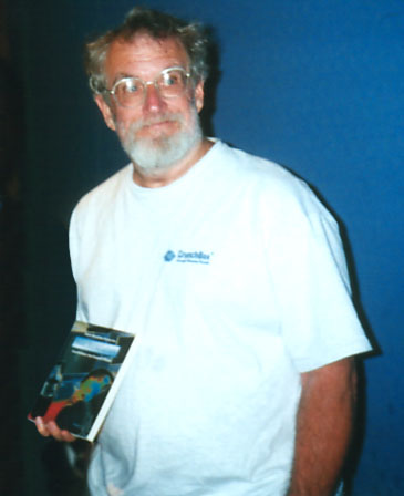 Fonte: Wikipedia.de